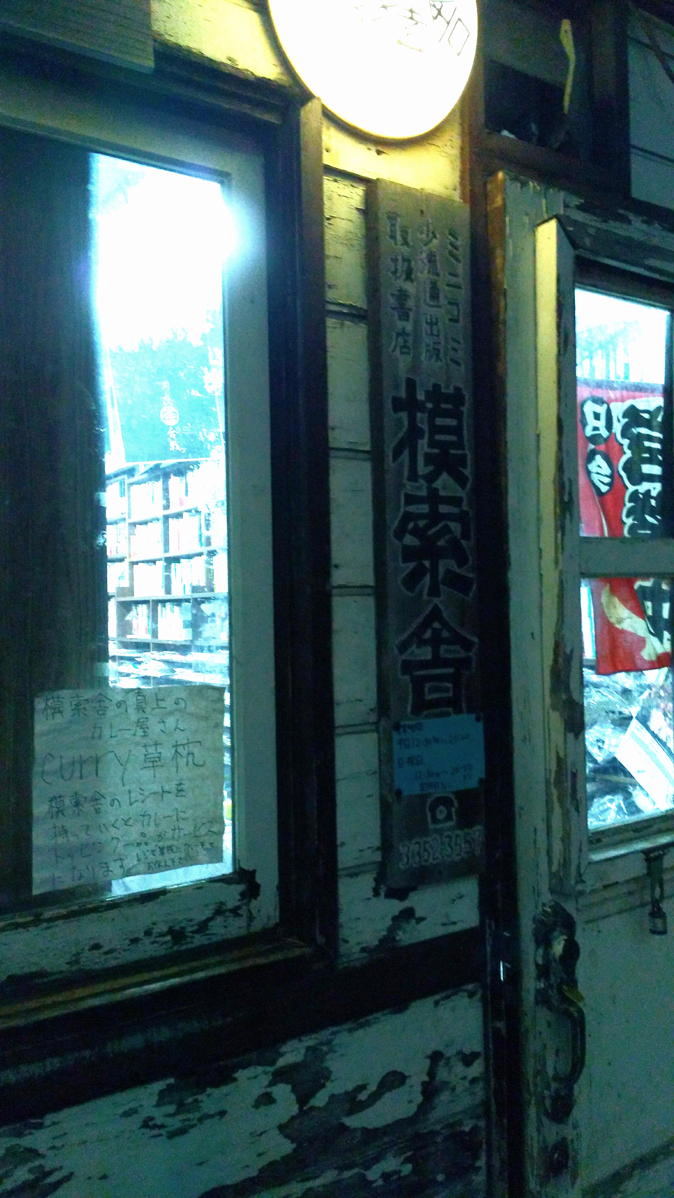 模索舎